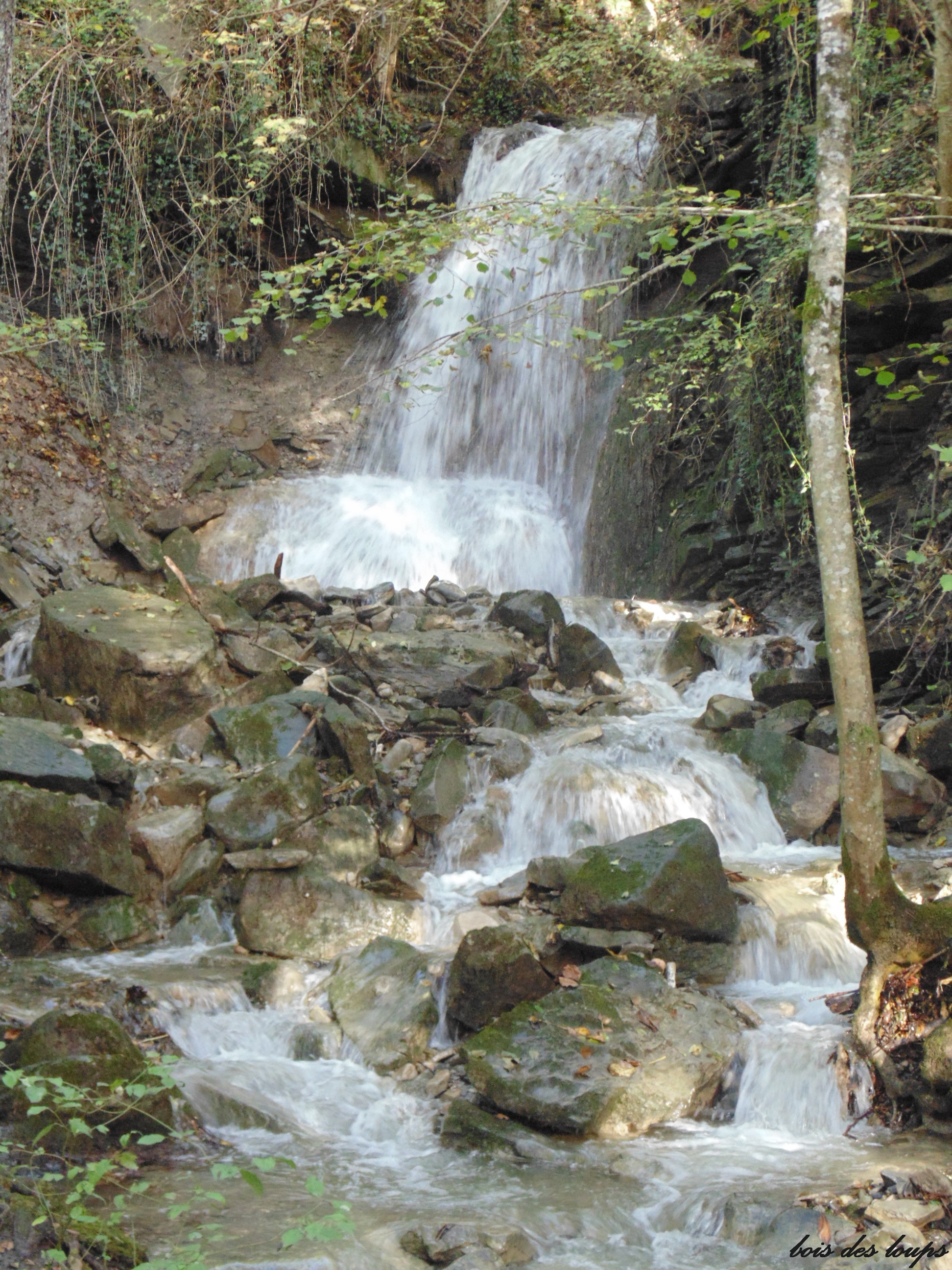 26 octobre 2013